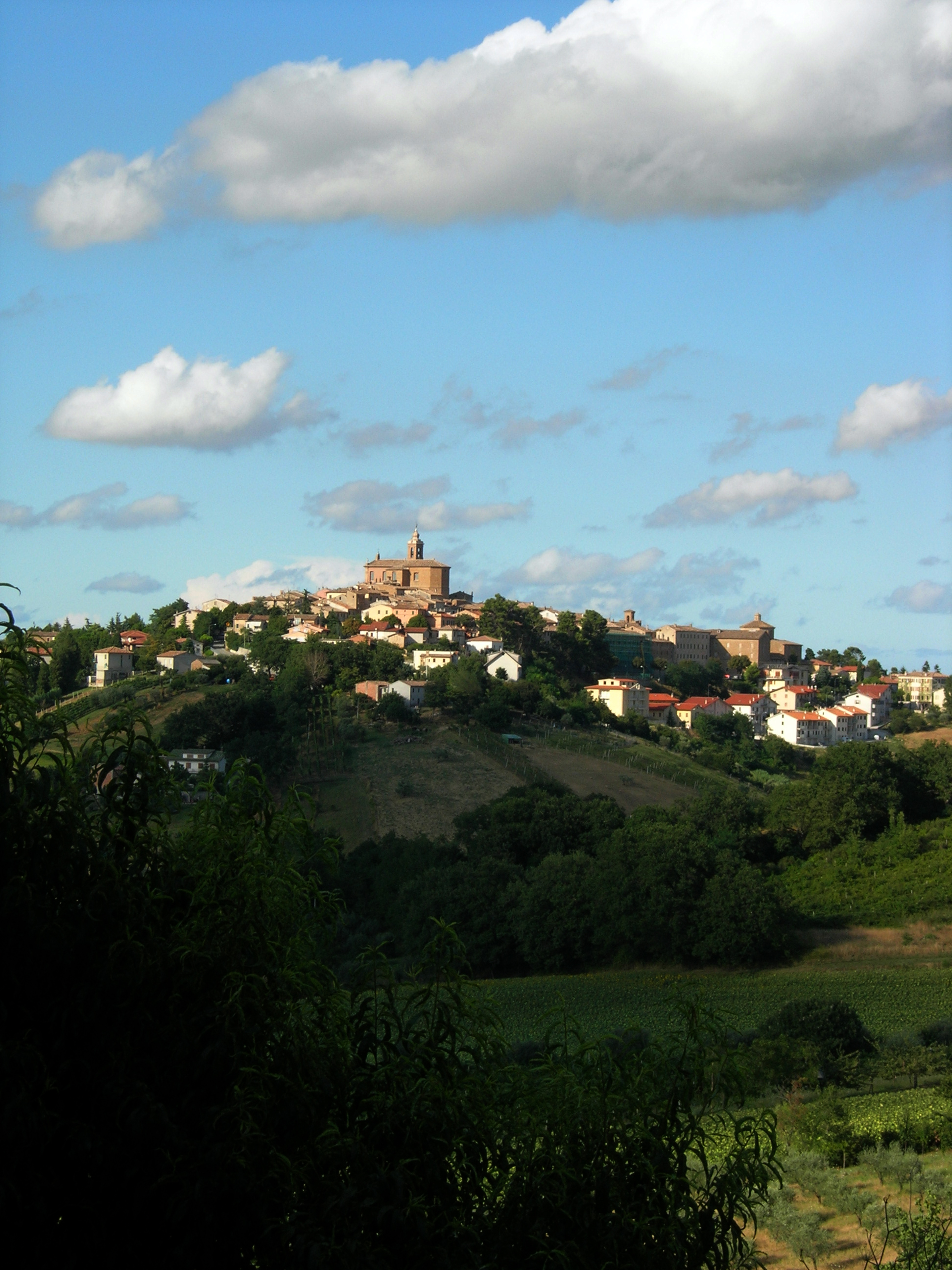 Al centro della foto svetta la chiesa parrocchiale SS. Annunziata. A destra si riconoscono la chiesa di San Filippo e il Teatro comunale.